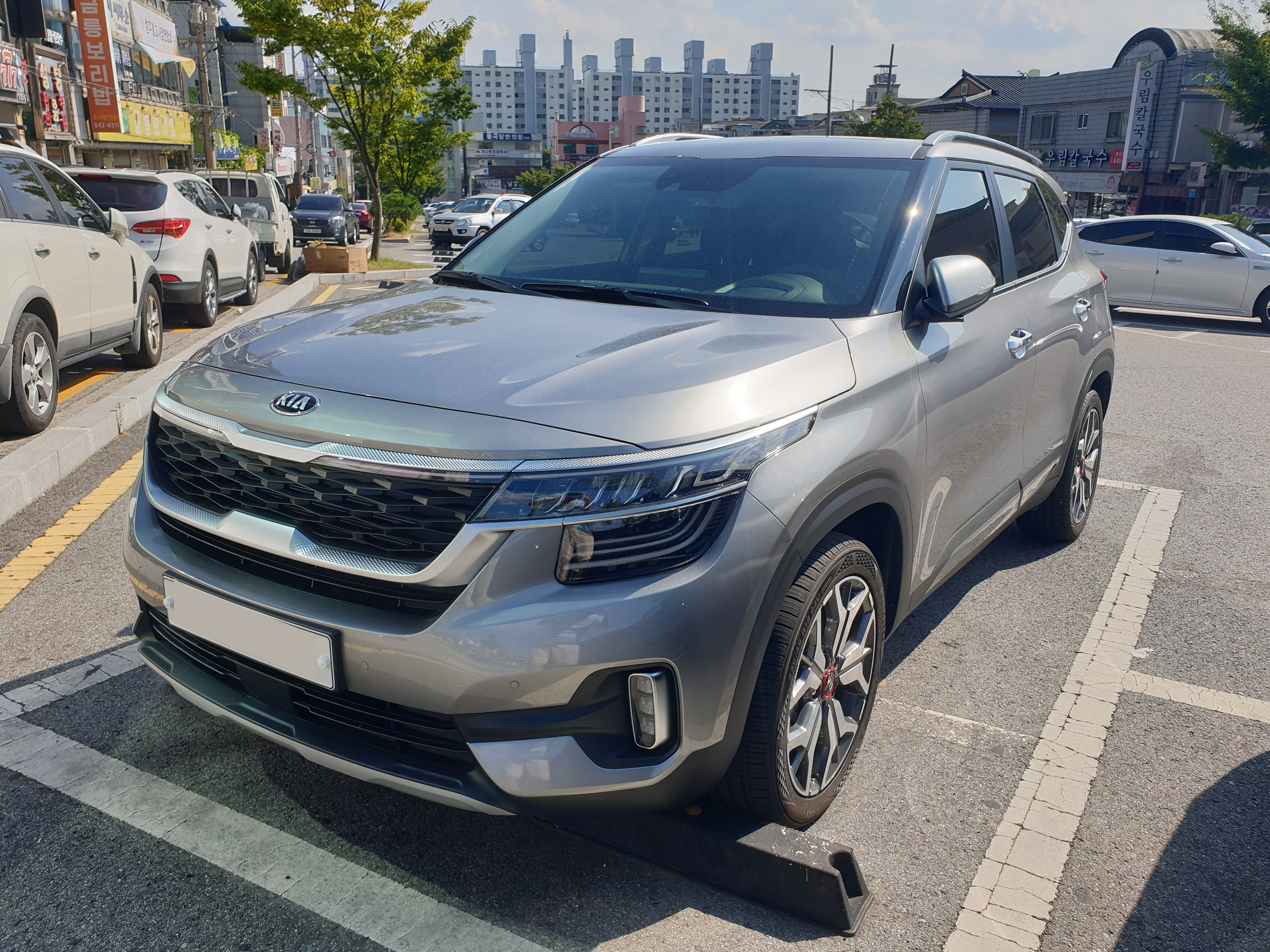 기아 셀토스 정측면